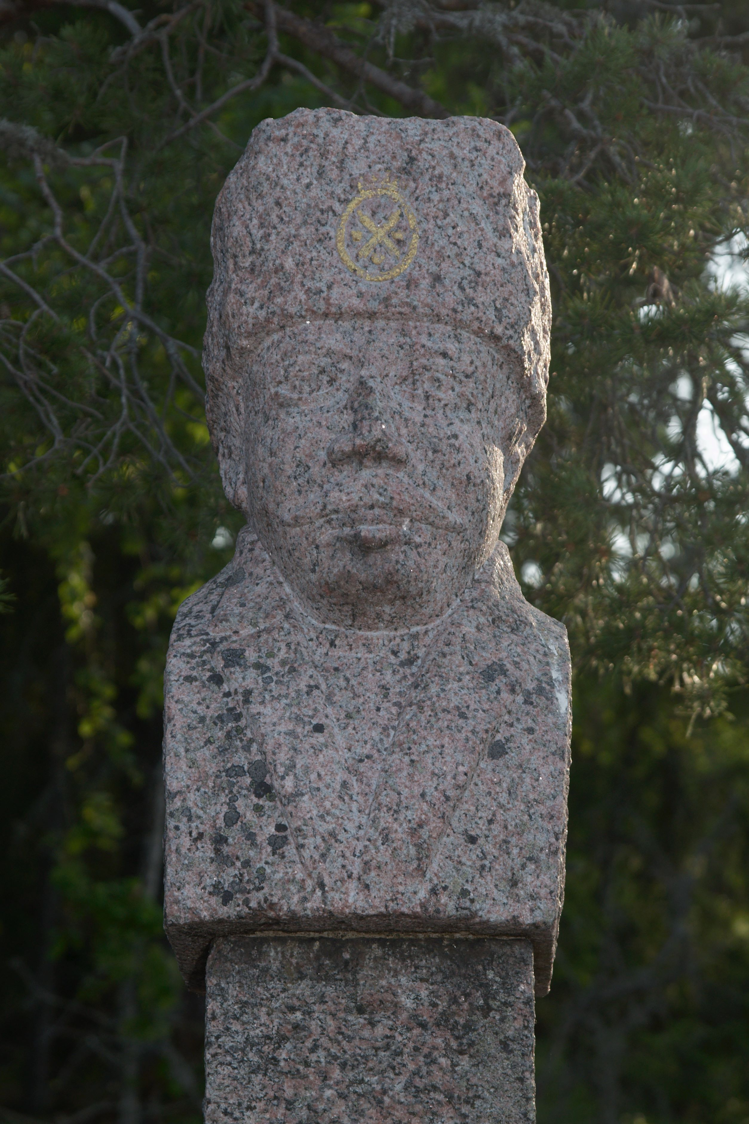 Cloudberry fotosafari, skulpturen Länsman i vätögranit, 1946, gjord av stenhuggaren Alfred Quick. Placerad på Vätöberg, Vätö, Roslagen